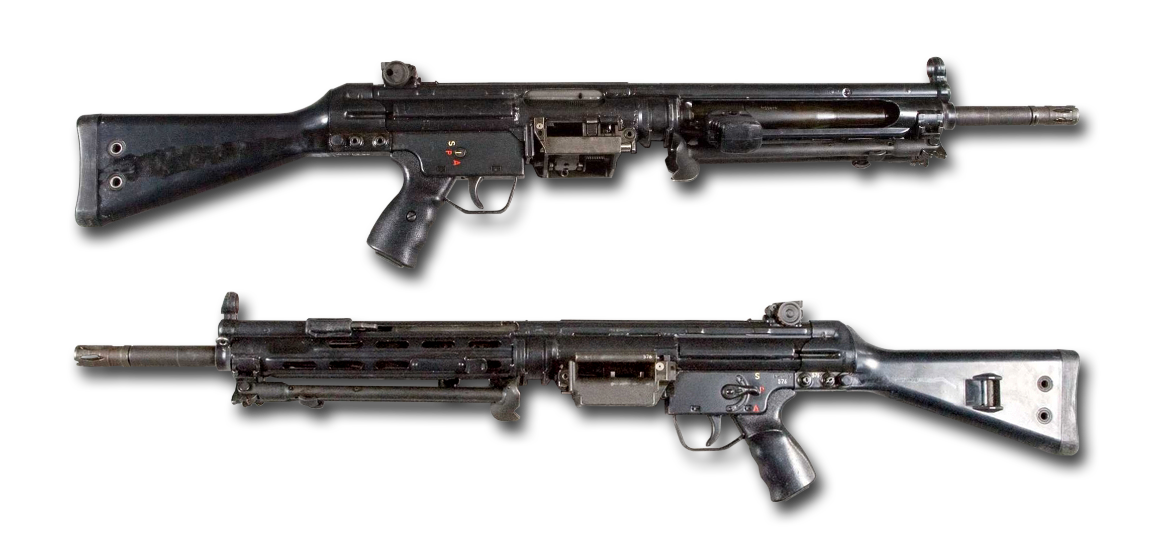 "HK 21 LMG" Heckler & Koch, Leichtes Maschinengewehr. Militärische Bezeichnung: G8